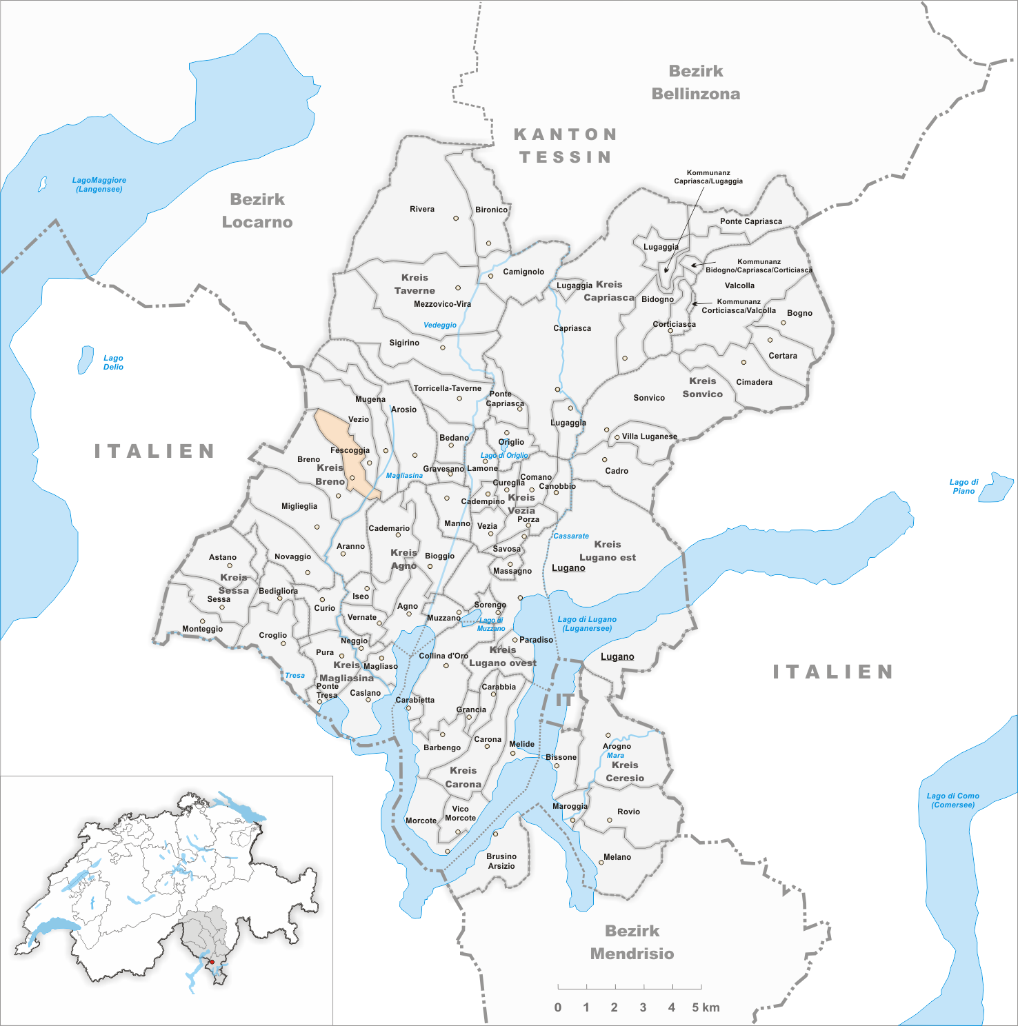 Municipality Fescoggia Artist: Tschubby